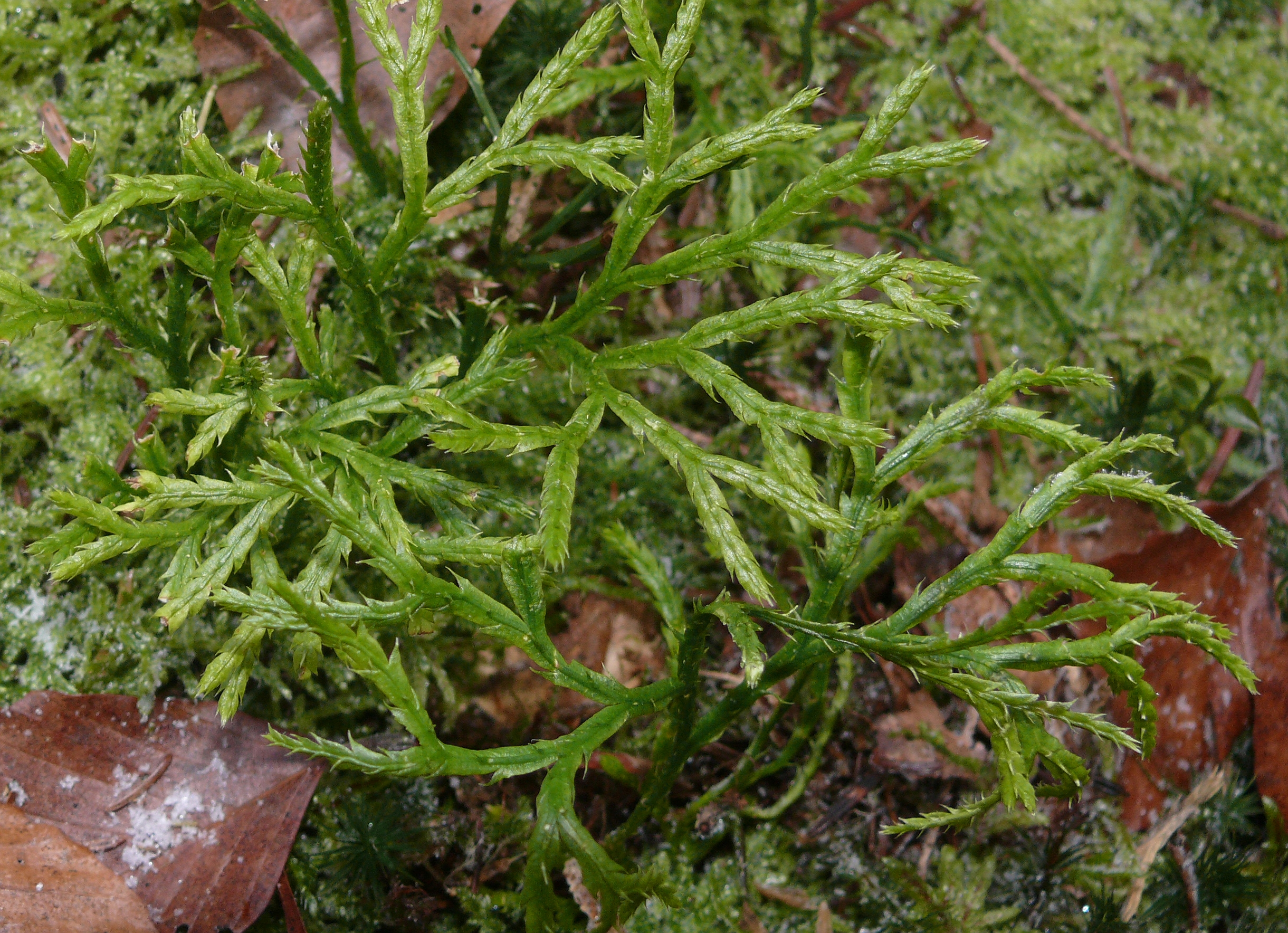 Diphasiastrum complanatum, Schwäbisch-Fränkische Waldberge, Germany